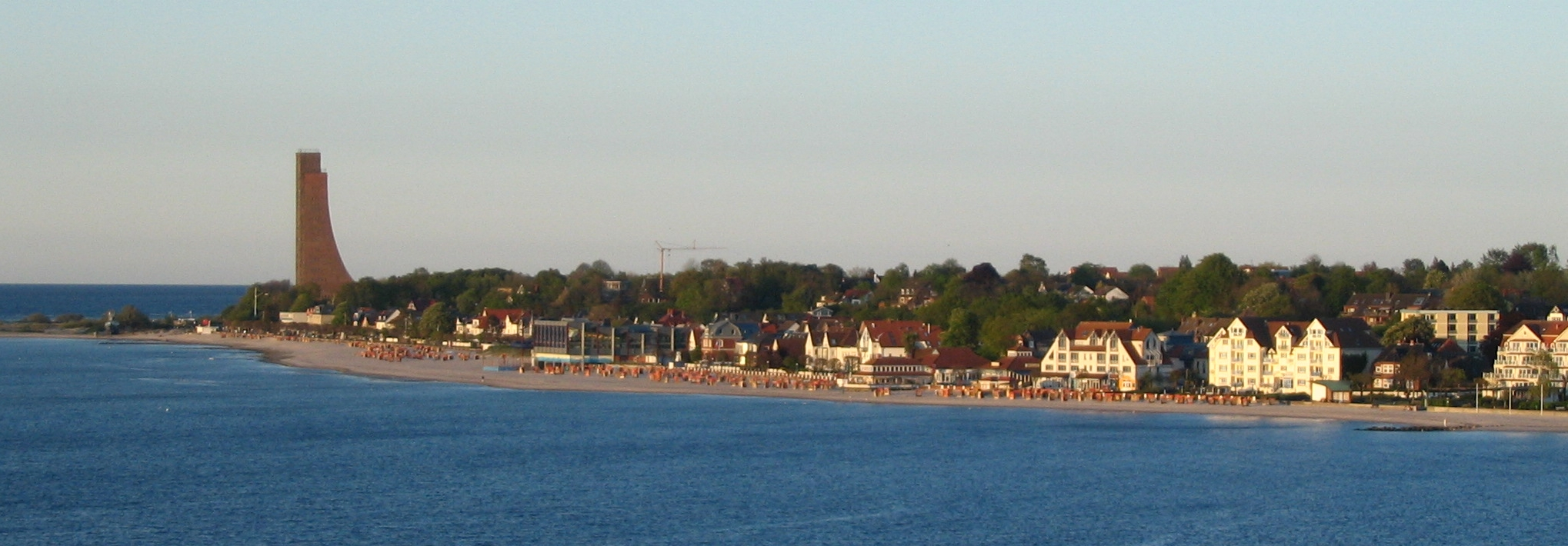 Laboe und Marinedenkmal